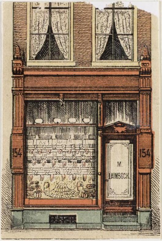 Anonymous. Kalverstraat 154, Amsterdam (Firma M. Laimbock, magazijn van Tyroler handschoenen). Ca. 1884-1890. Amsterdam, Stadsarchief (inv.nr. 010194000427).